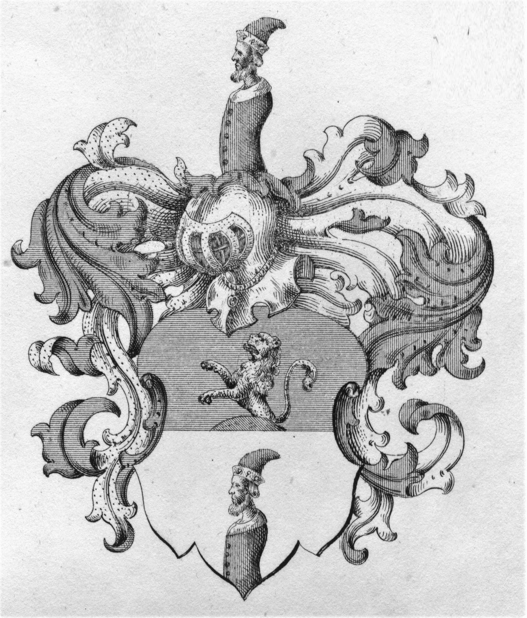 Herb von Schliefen